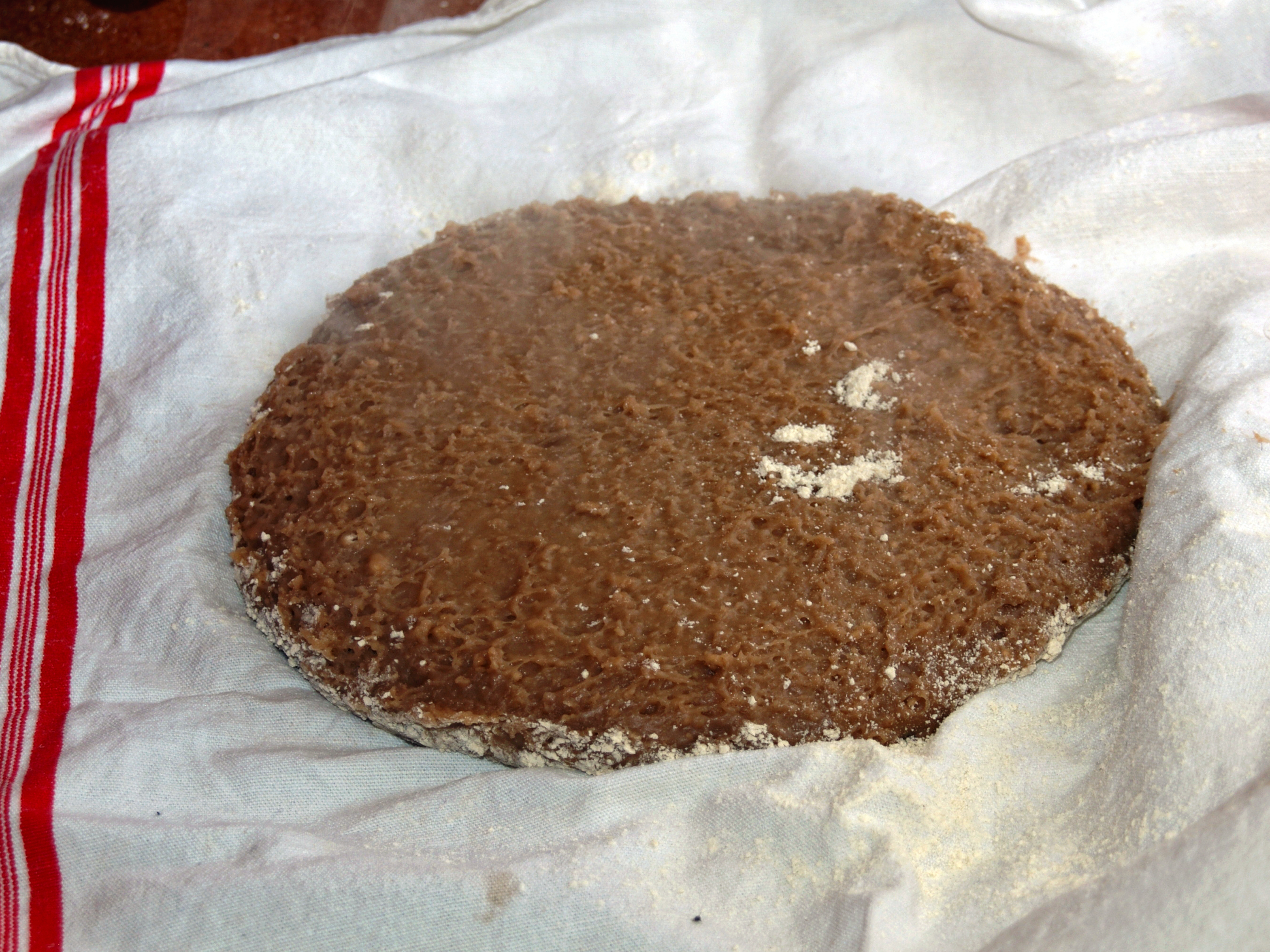 Pulenda - Mets de Corse à base de farine de châtaigne